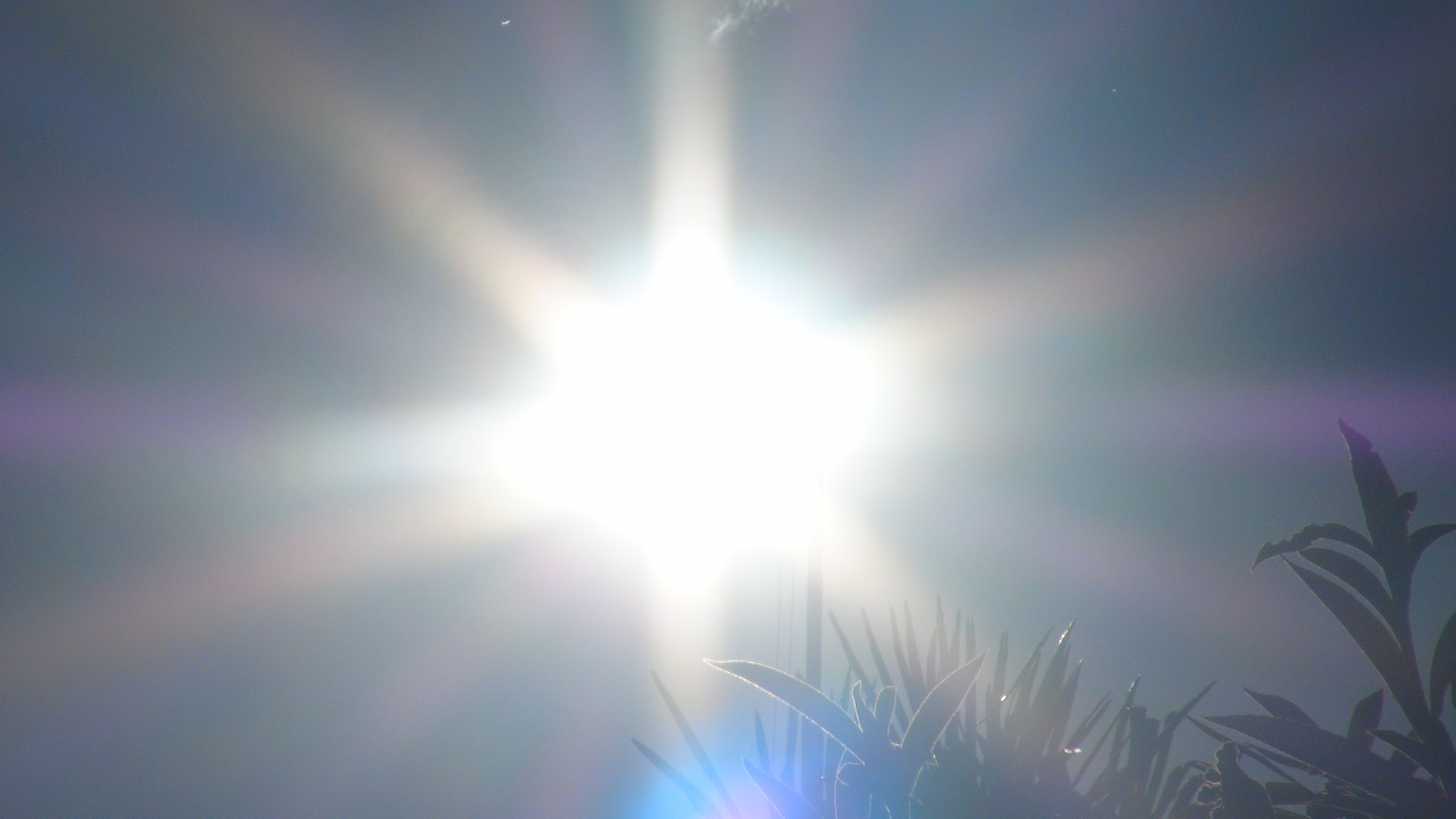 Tarde de sol en plena cuarentena el día viernes 1 de mayo de 2020. Tomada desde Villa Devoto, Buenos Aires, Argentina